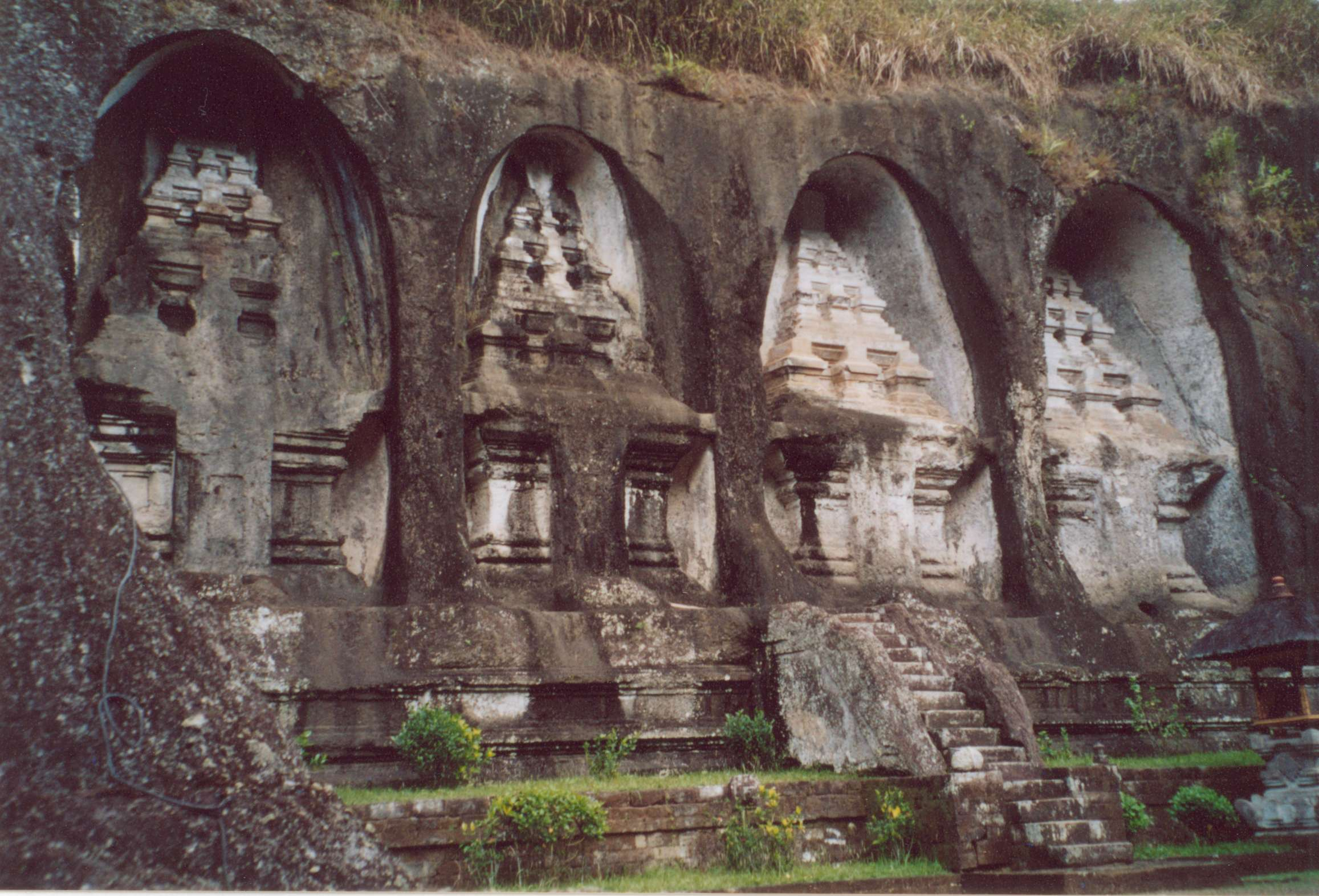 Gunung Kawi (Bali, Indonesia)